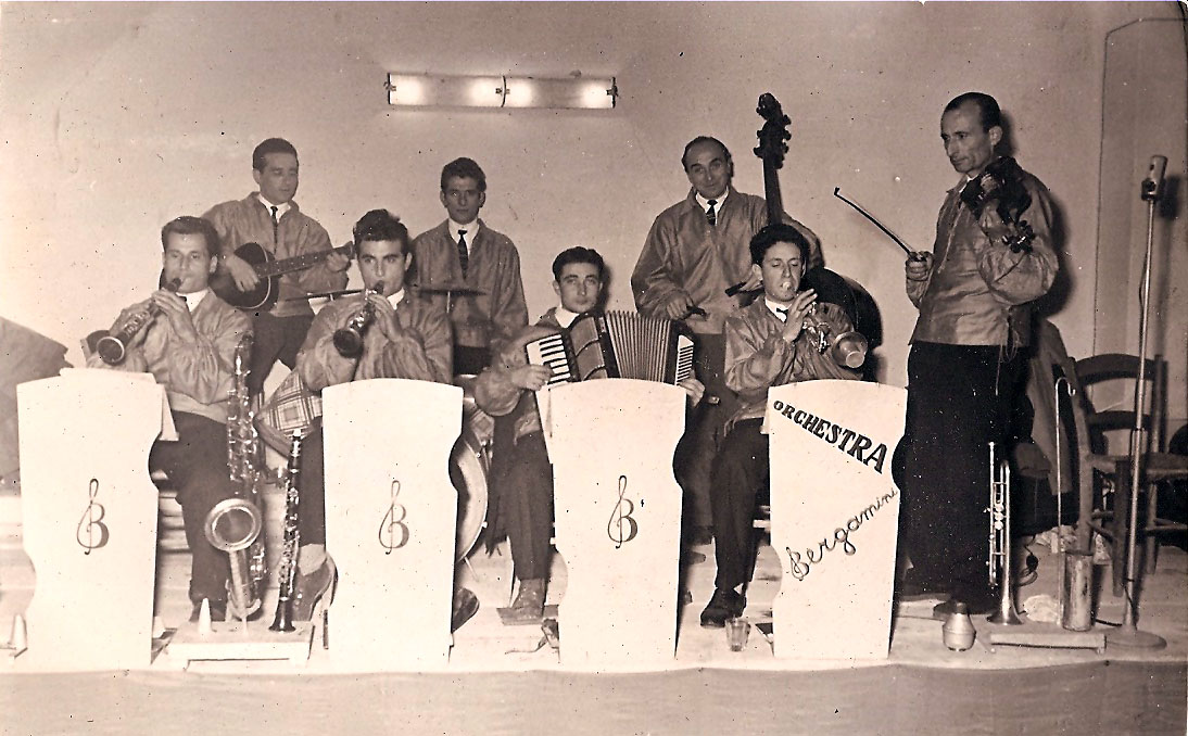 Prima formazione dell'Orchestra Bergamini